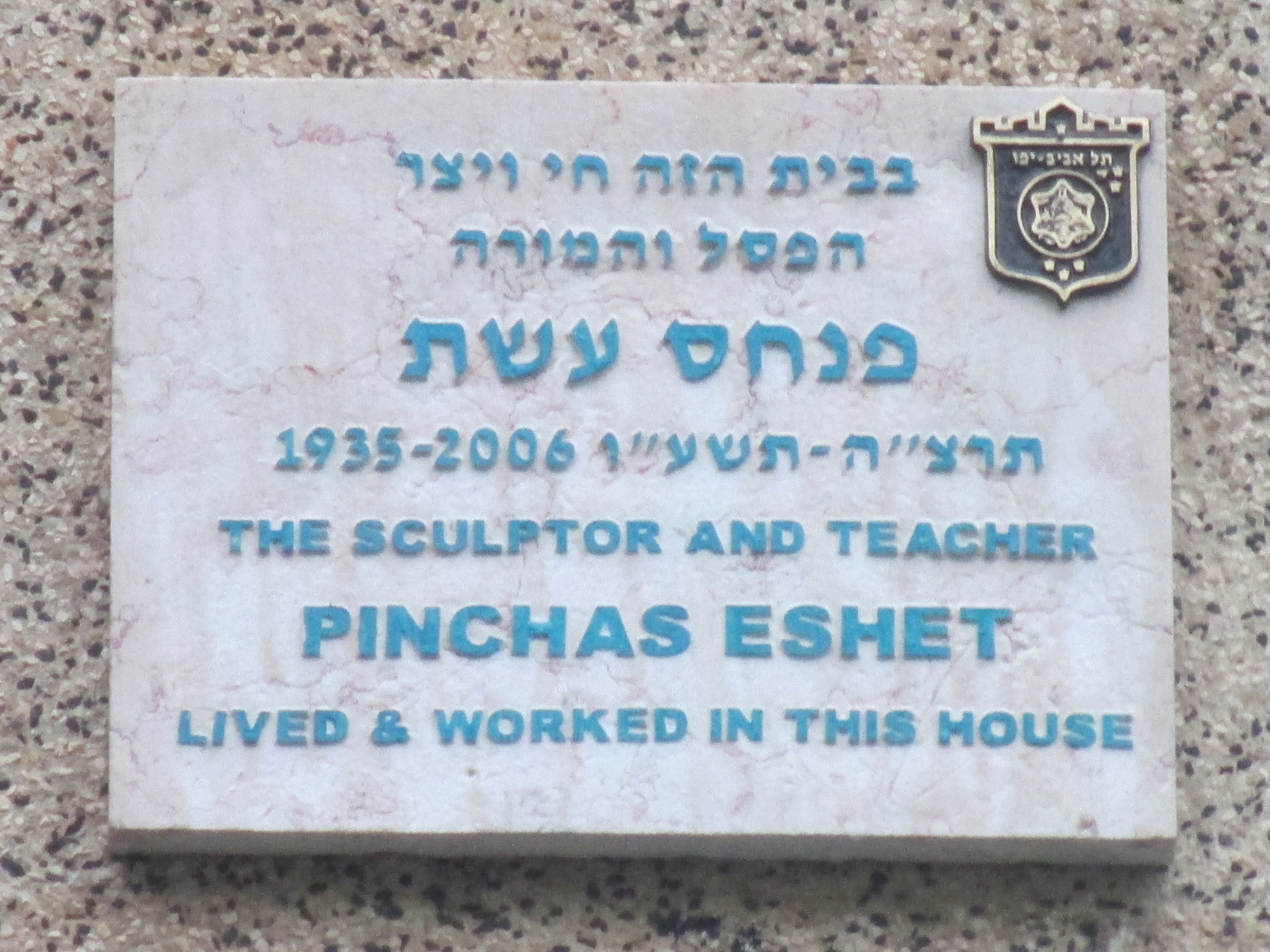 לוחית זיכרון לפנחס עשת ברח' פרץ חיות 5 בתל אביב